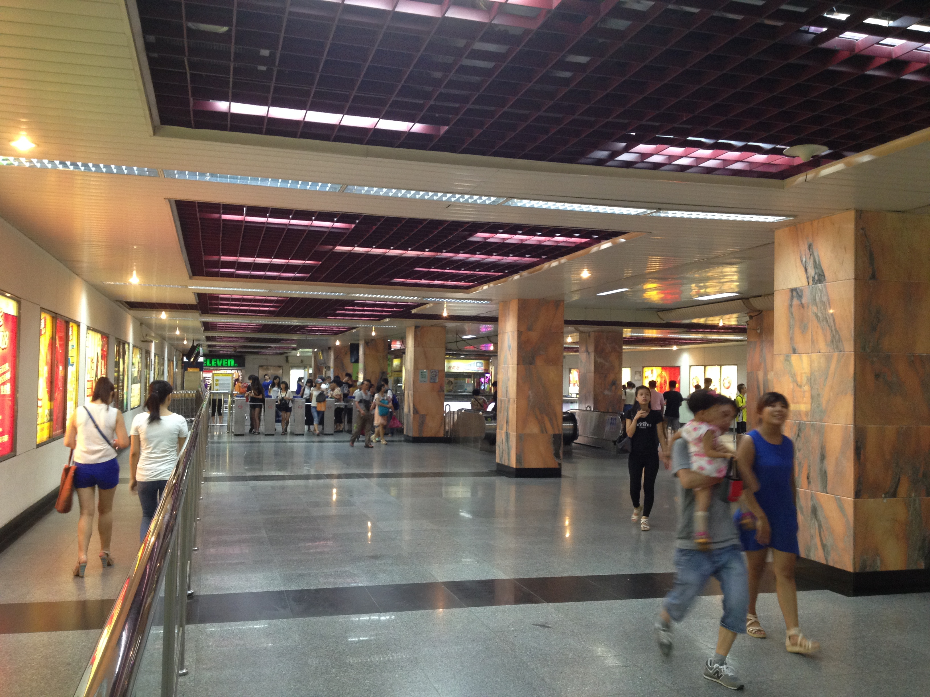 广州地铁芳村站站厅